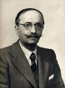 Джованни Пастроне (1883-1959) — итальянский режиссёр, кинорежиссёр, актёр, сценарист, продюсер.